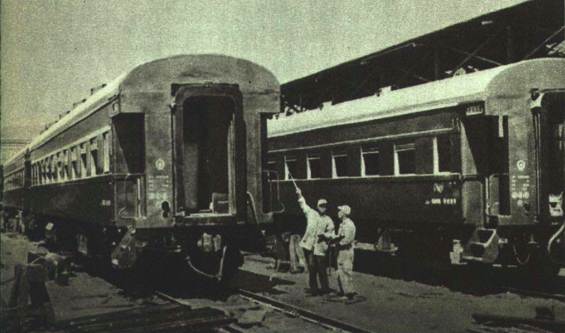 1953年青岛四方机车车辆厂制造新客车